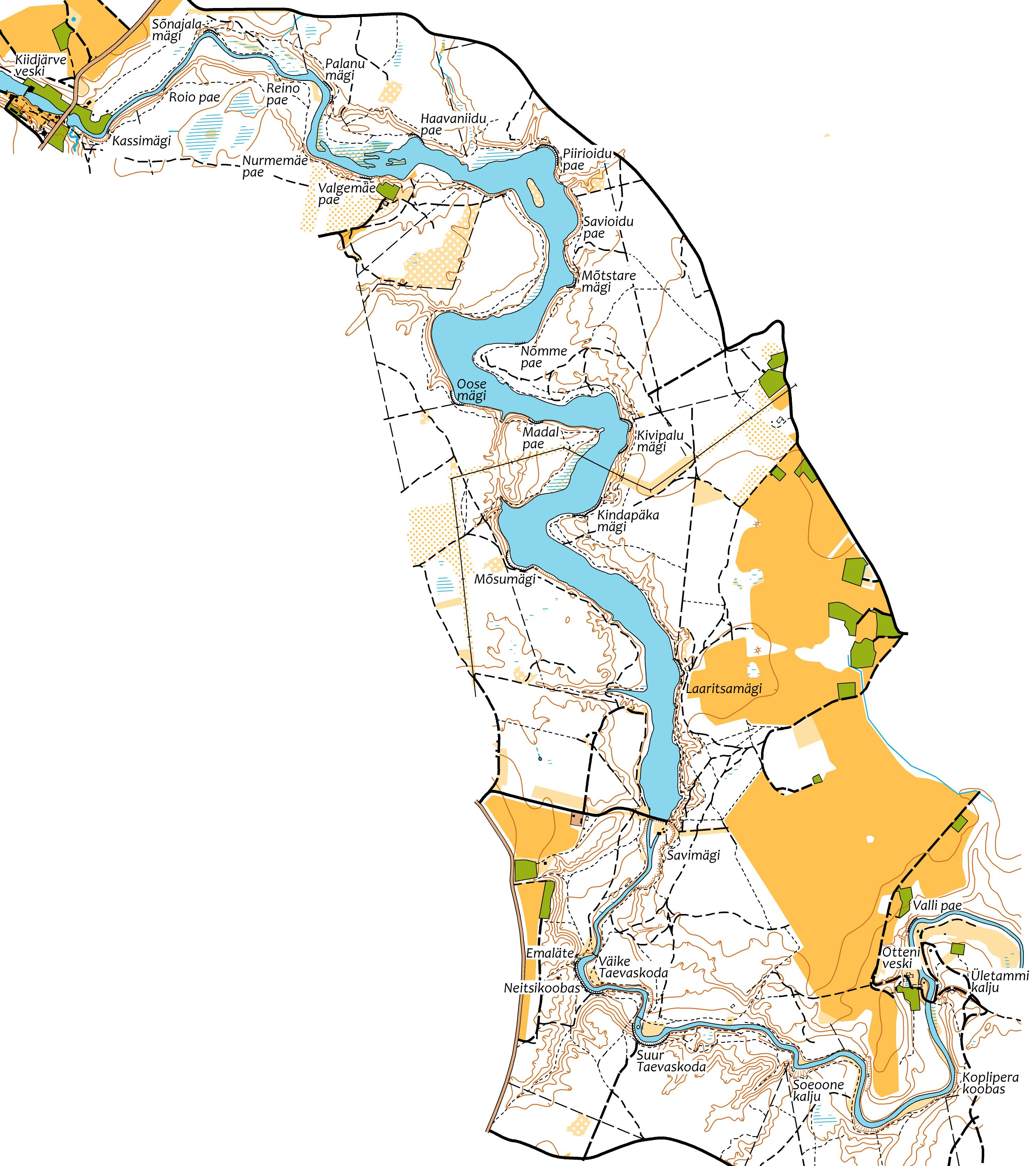 Paljandid Ahja jõe keskjooksul Kiidjärve veski ja Otteni veski vahelisel lõigul